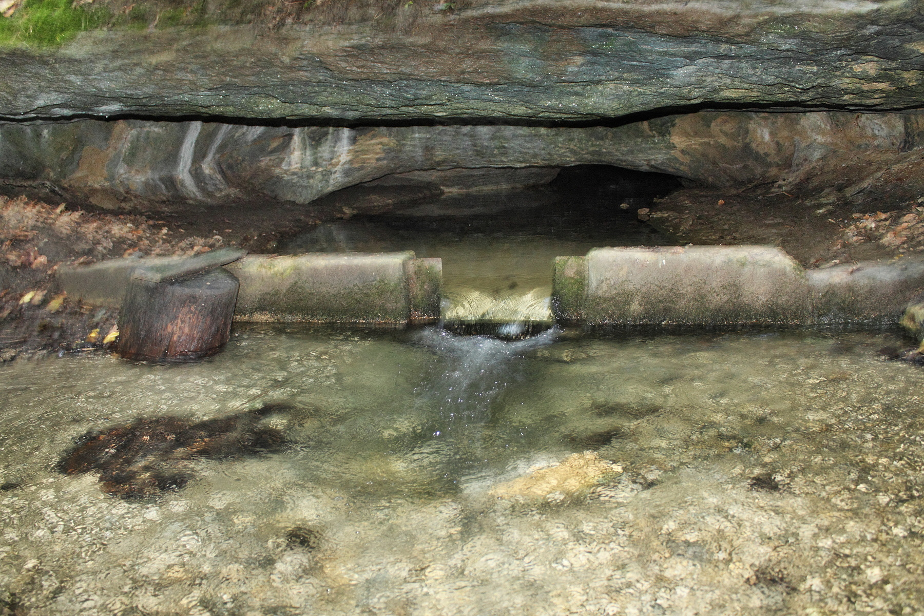 Bartošova Pec - ústí